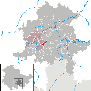 Wittgendorf in Thuringia - District Saalfeld-Rudolstadt